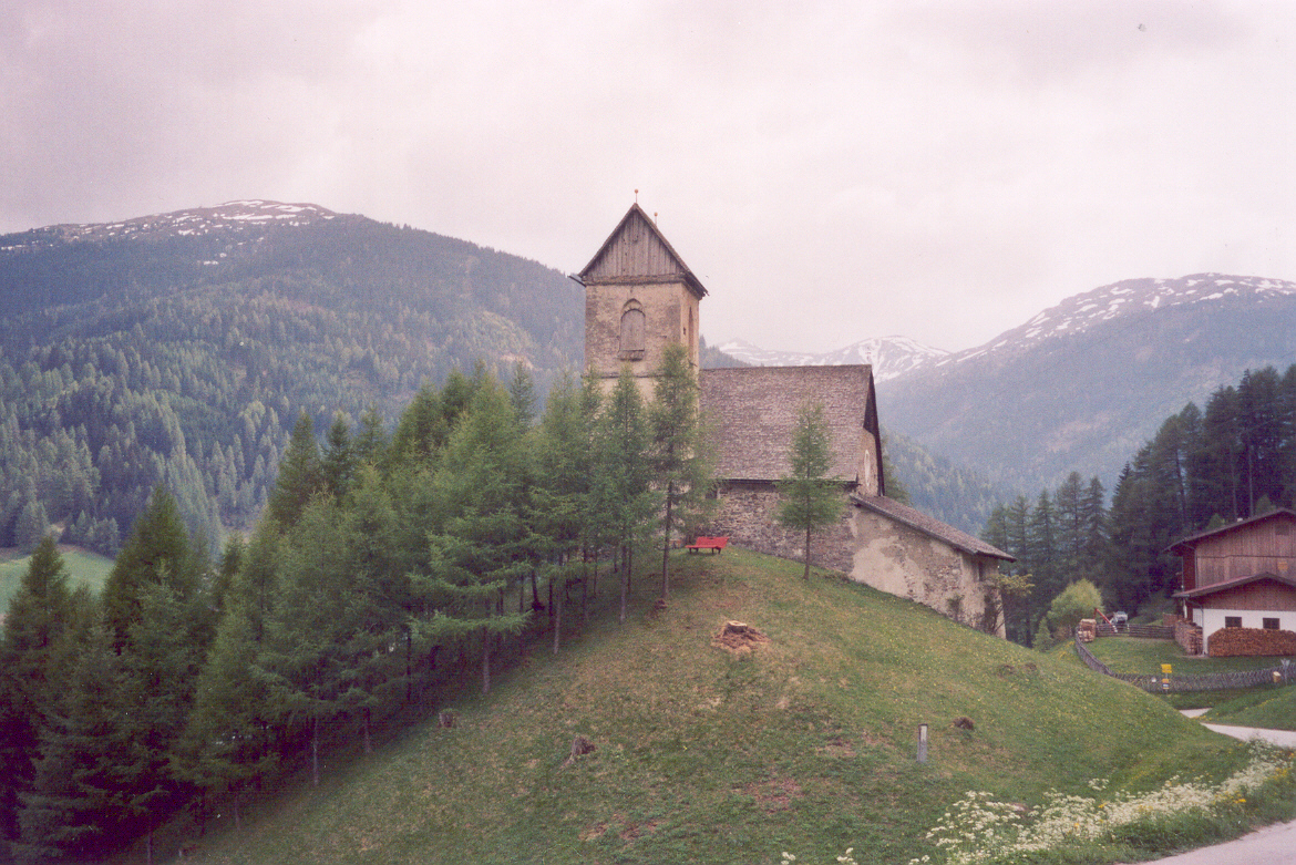 Jakobove poti se vijejo domala po vsej Evropi. Slovenski popotniki in romarji, ki začnejo pot iz hišnega praga, naletijo na preprosto cerkvico, posvečeno svetemu Jakobu, kmalu po prečkanju prelaza Brenner na začetku avstrijske Tirolske.